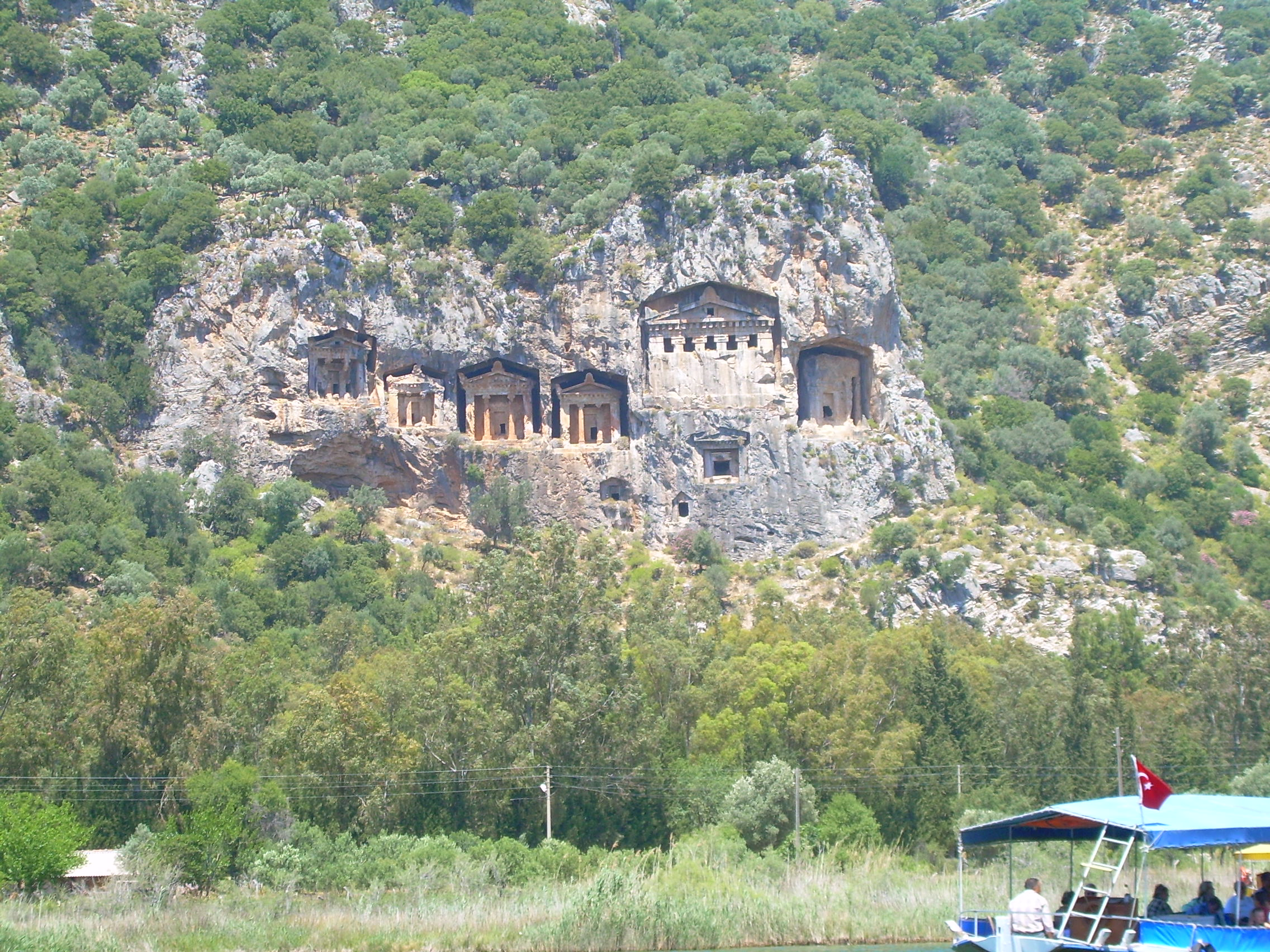 Kaunos'taki kral mezarları